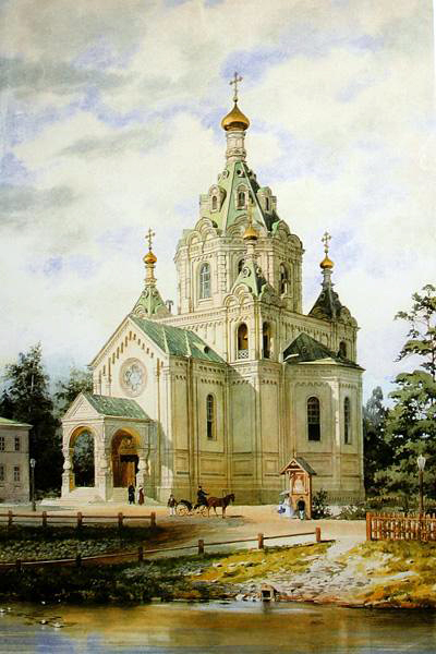 Н. Бенуа Вид церкви святителя Николая Чудотворца на Выборгской стороне.